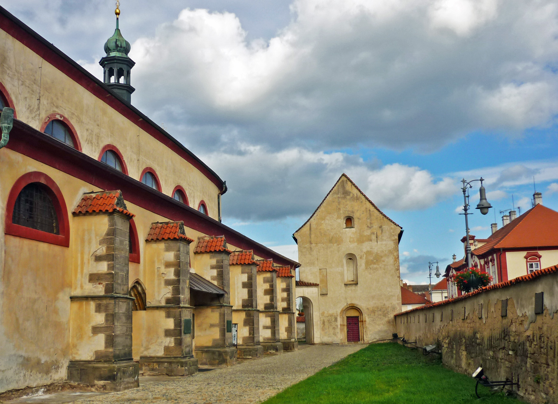 St. Wenzel-Basilika und Klemenskirche in Altbunzlau (Stará Boleslav)